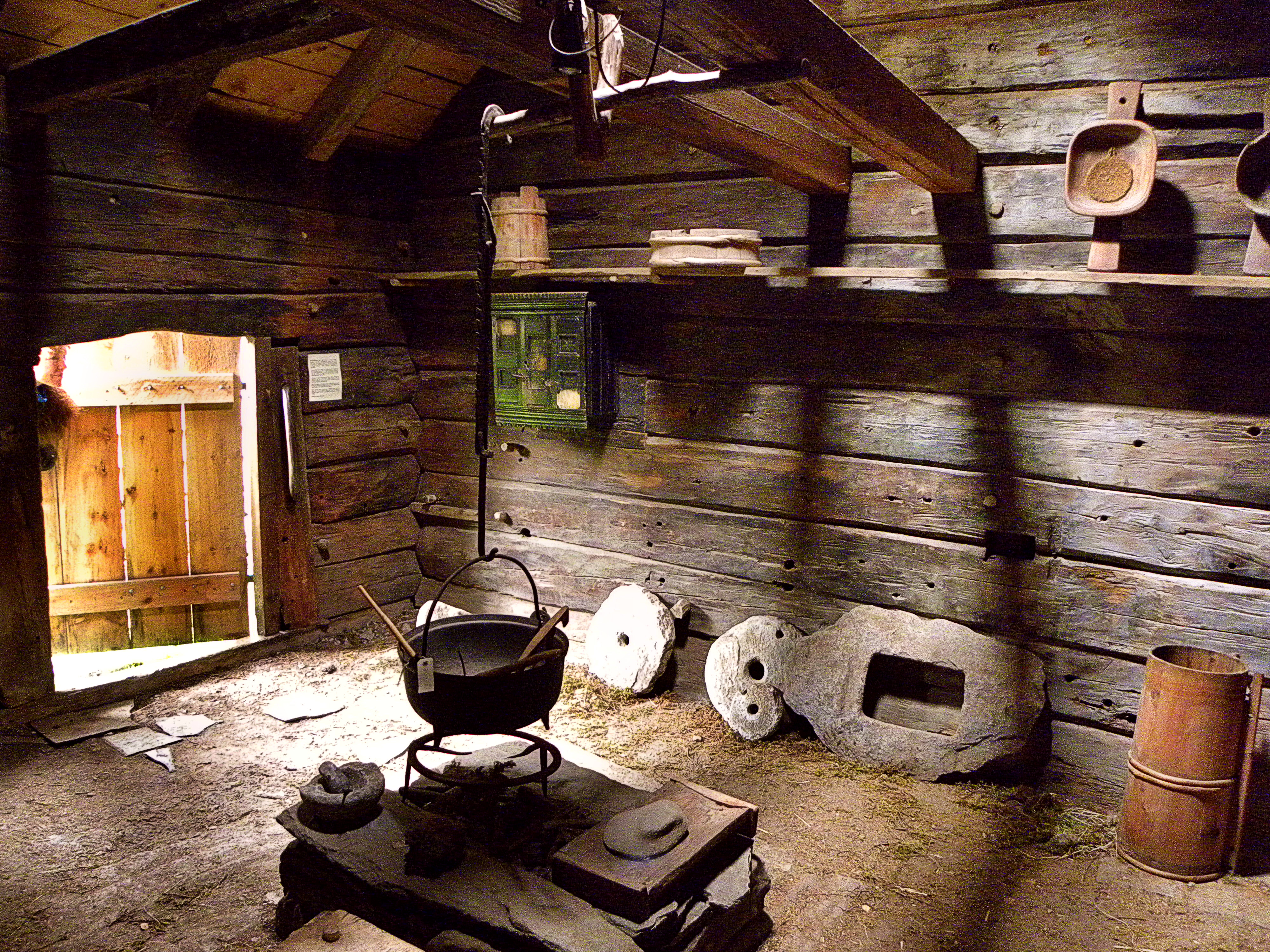 Huset er muligens fra 1500-tallet.